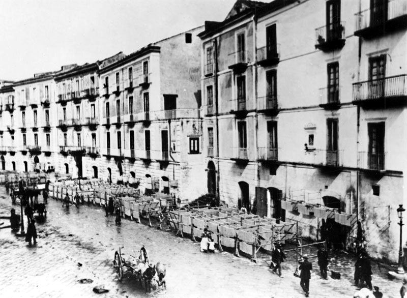 Gragnano (NA), via Roma. Fabbriche di maccheroni con spaghetti stesi ad asciugare. Autore sconosciuto.